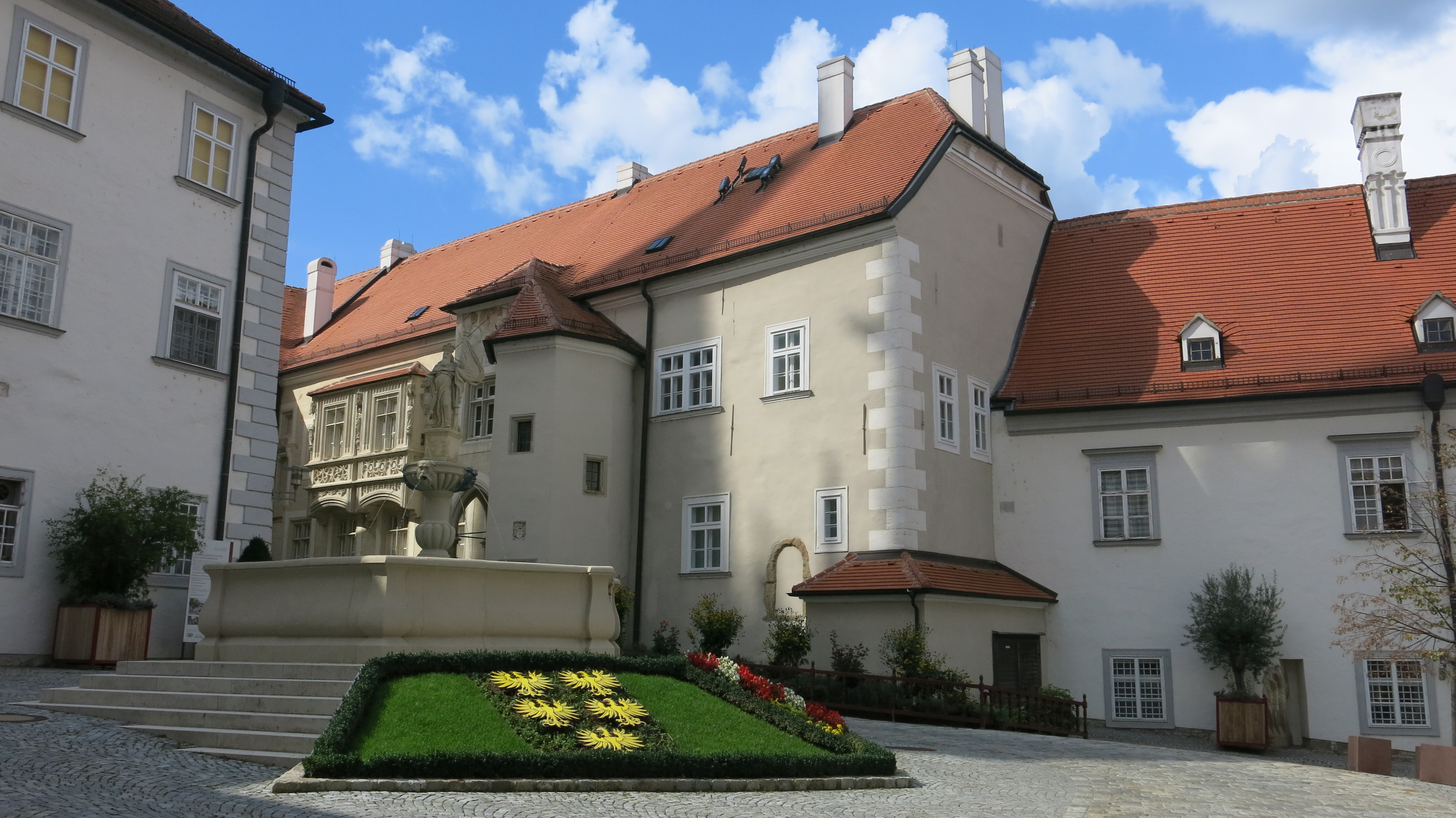 Klosterneuburg – Stift Dieses Bild wurde anlässlich des österreichischen Tags des Denkmals 2014 in Niederösterreich eingereicht.